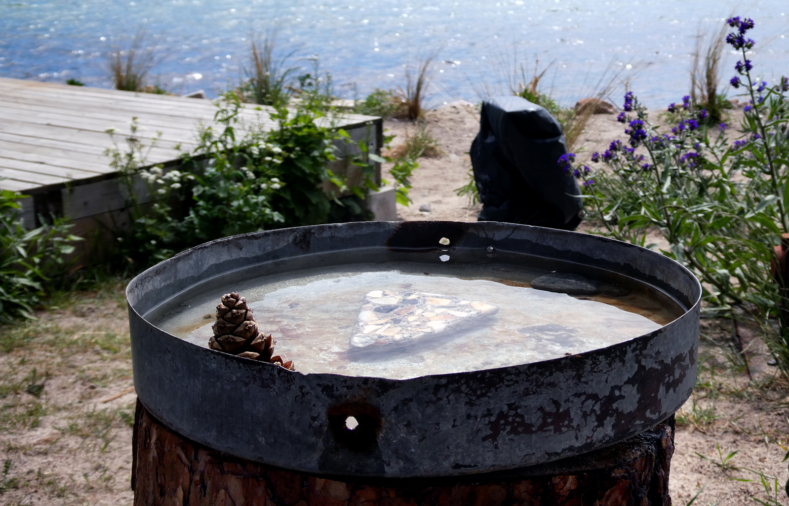 Ett fågelbad med sötvatten vid havet är viktigt för alla fåglar som ej kan dricka saltvatten. Detta vid Världens ände i Ystad.